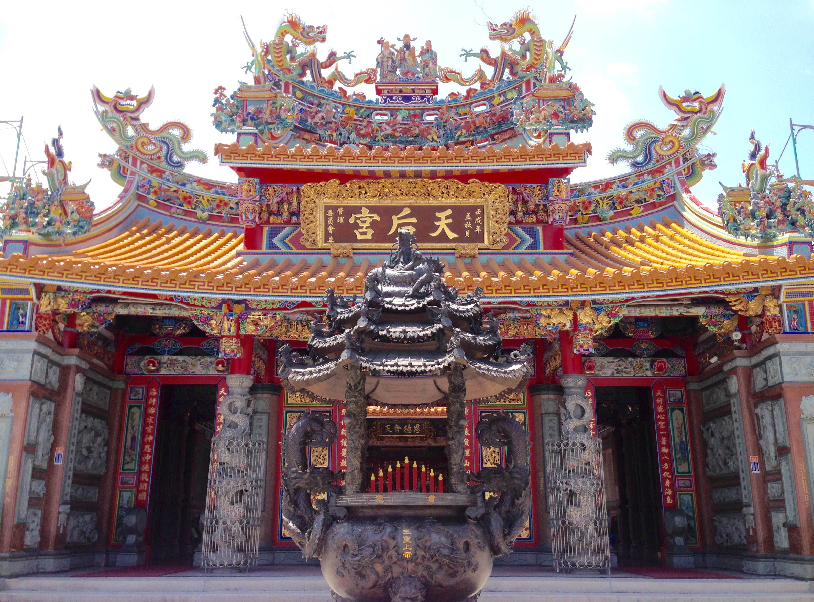 中文（台灣）: 台東天后宮三川殿